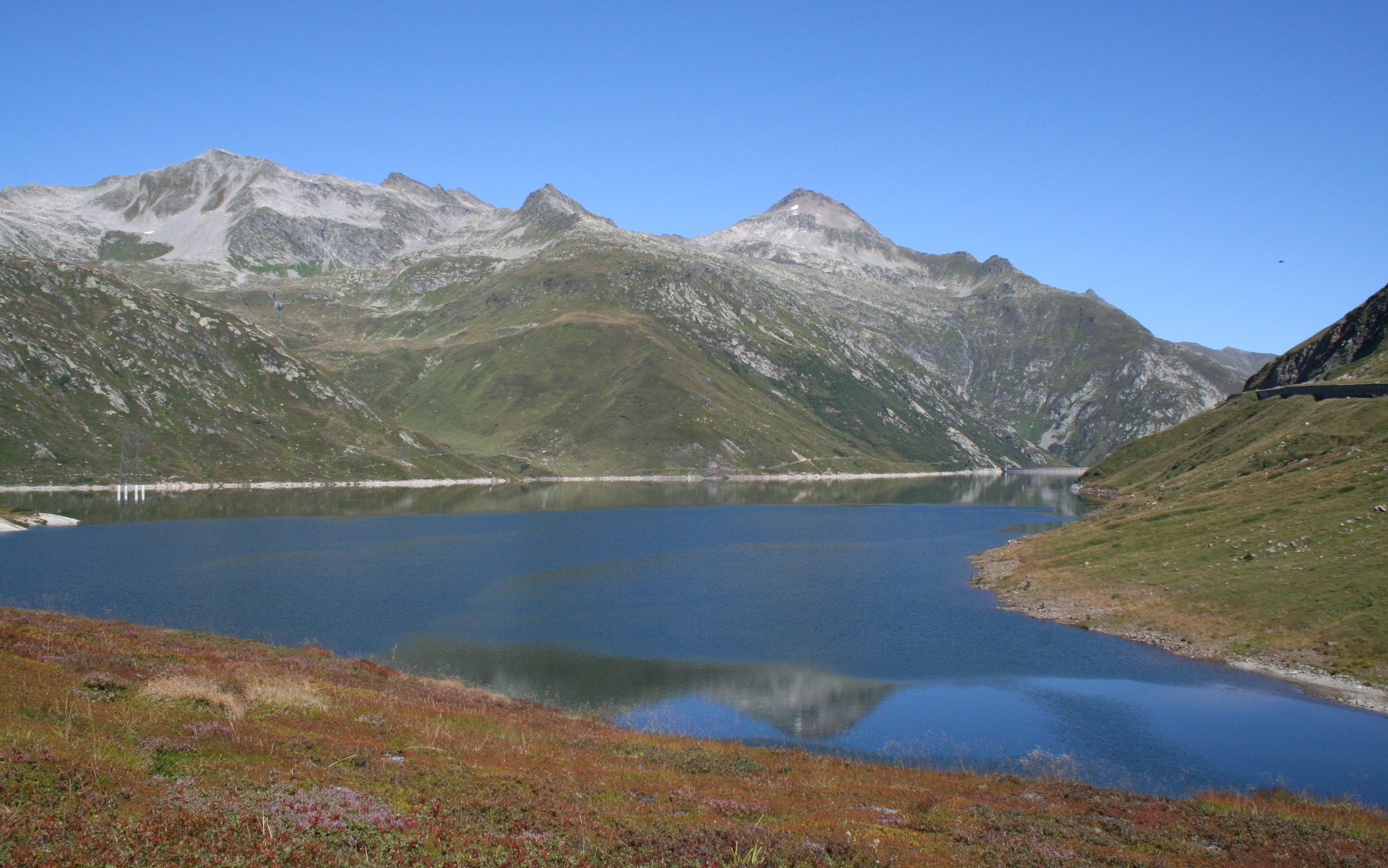 Lai da Sontga Maria, Blick nach Norden